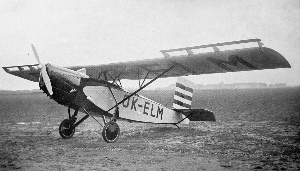 letecký motor Walter Minor 4 a letoun Letov Š-239 (1934)